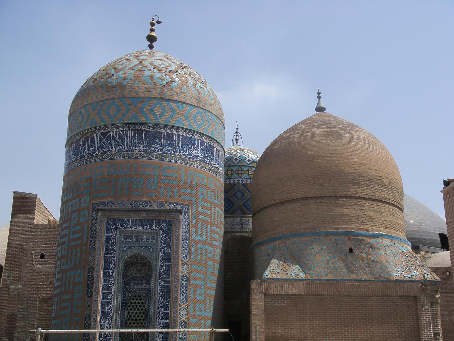 Sheikh-safi tomb, Ardabil, Iran